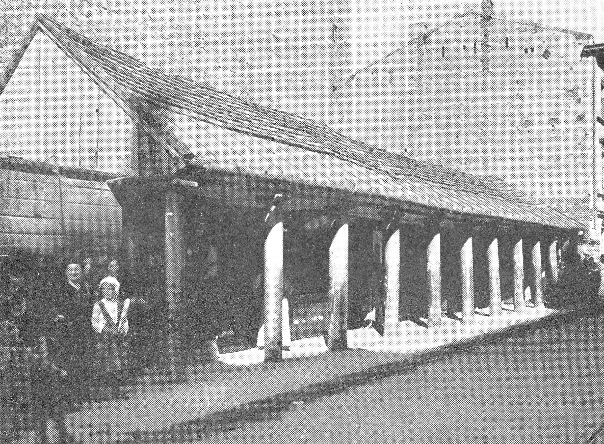 Dom u zbiegu ulic Targowej i Ząbkowskiej, w którym według tradycji przebywał Suworow podczas rzezi Pragi